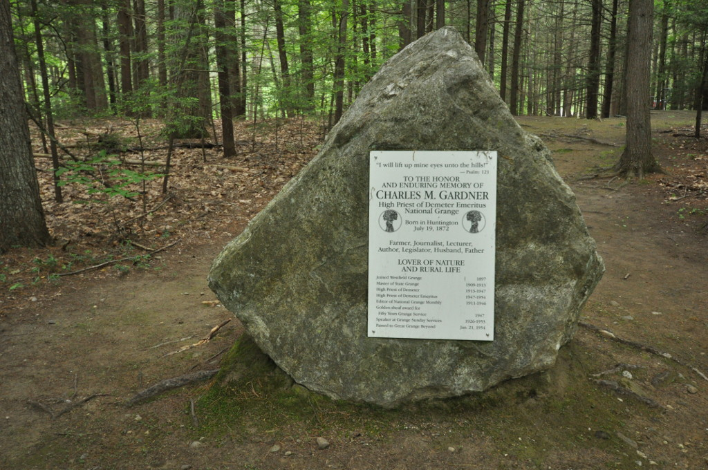 C.M. Gardner State Park, Huntington, Massachusetts.